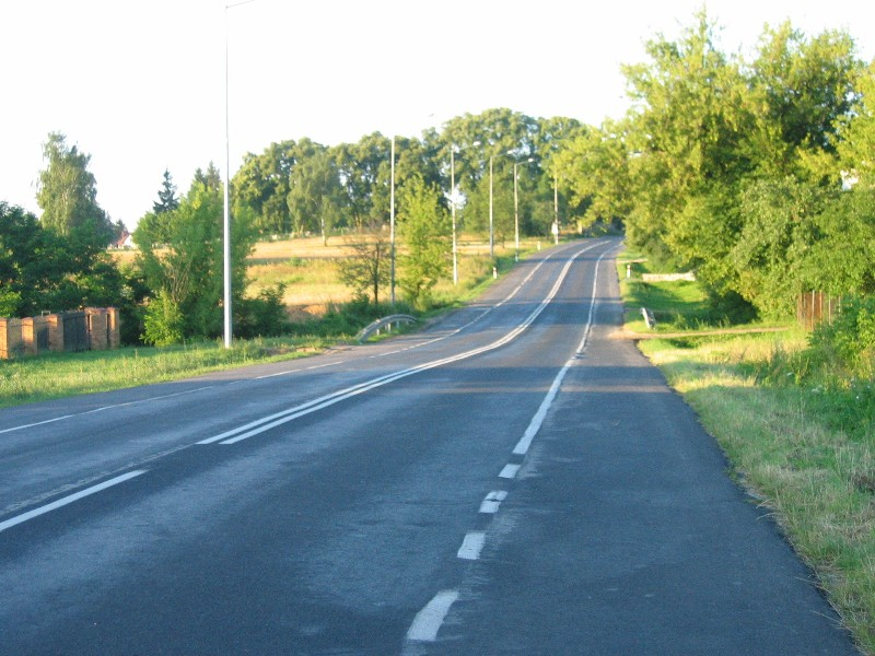 Okolice Czerniejowa